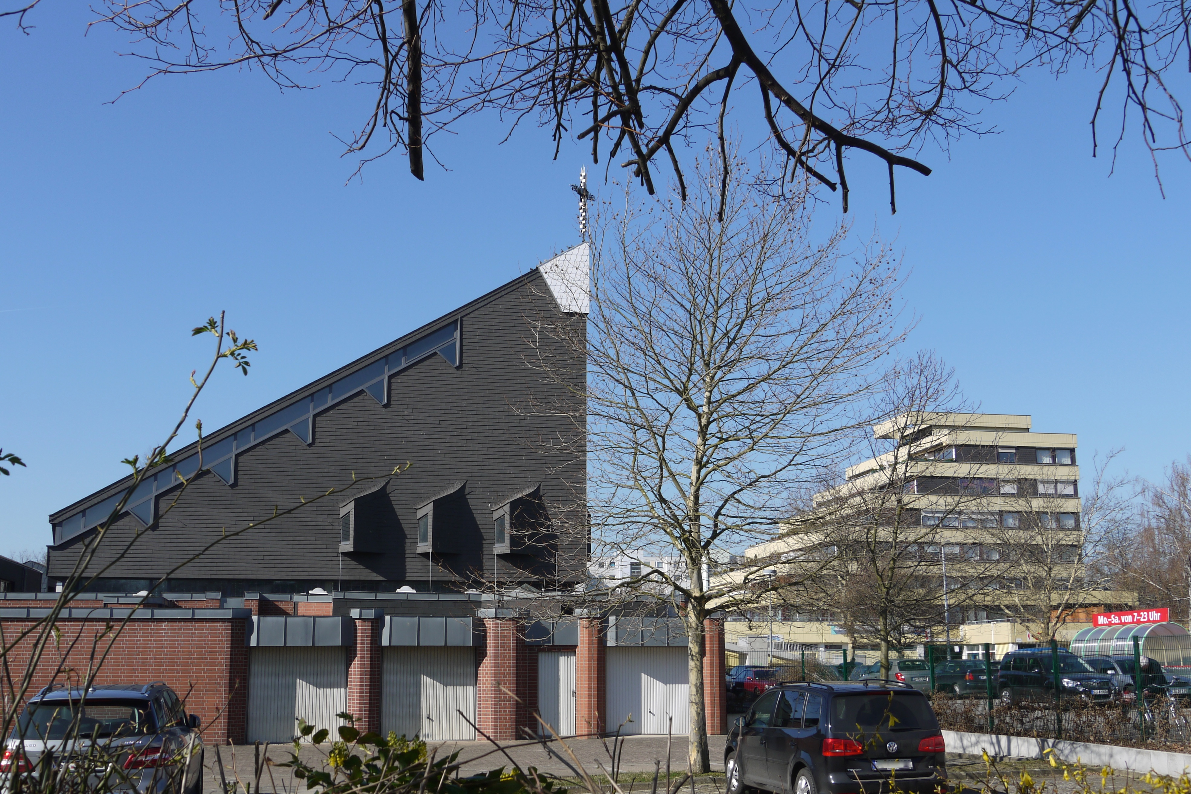 Salzgitter-Fredenberg: Links die St.-Maximilian-Kolbe-Kirche, im Hintergrund das Einkaufszentrum Kurt-Schumacher-Ring - Ecke Gaußstraße